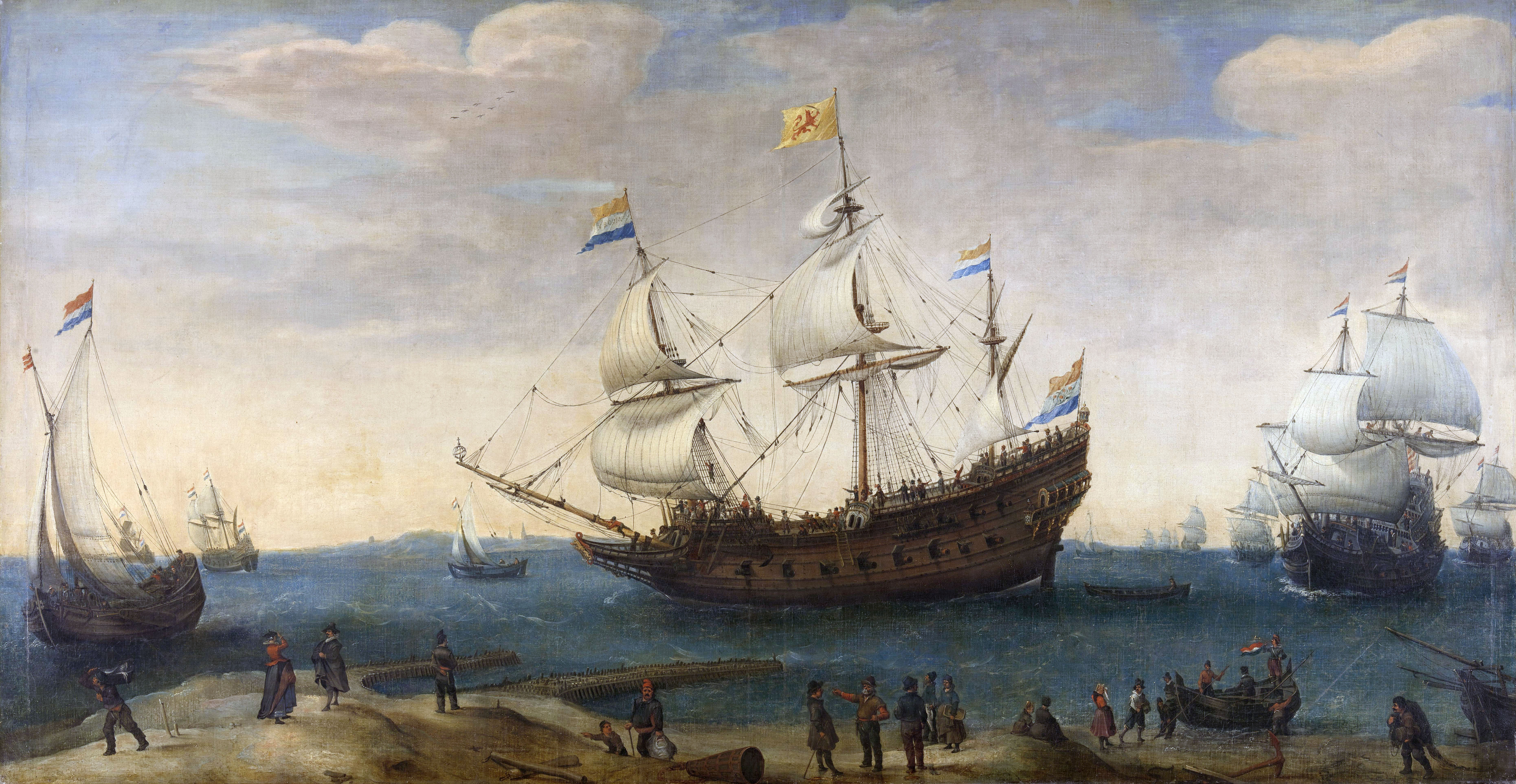 Een aantal Oostindiëvaarders voor de kust. Op de voorgrond tal van figuren bij de kust, rechts een sloep.